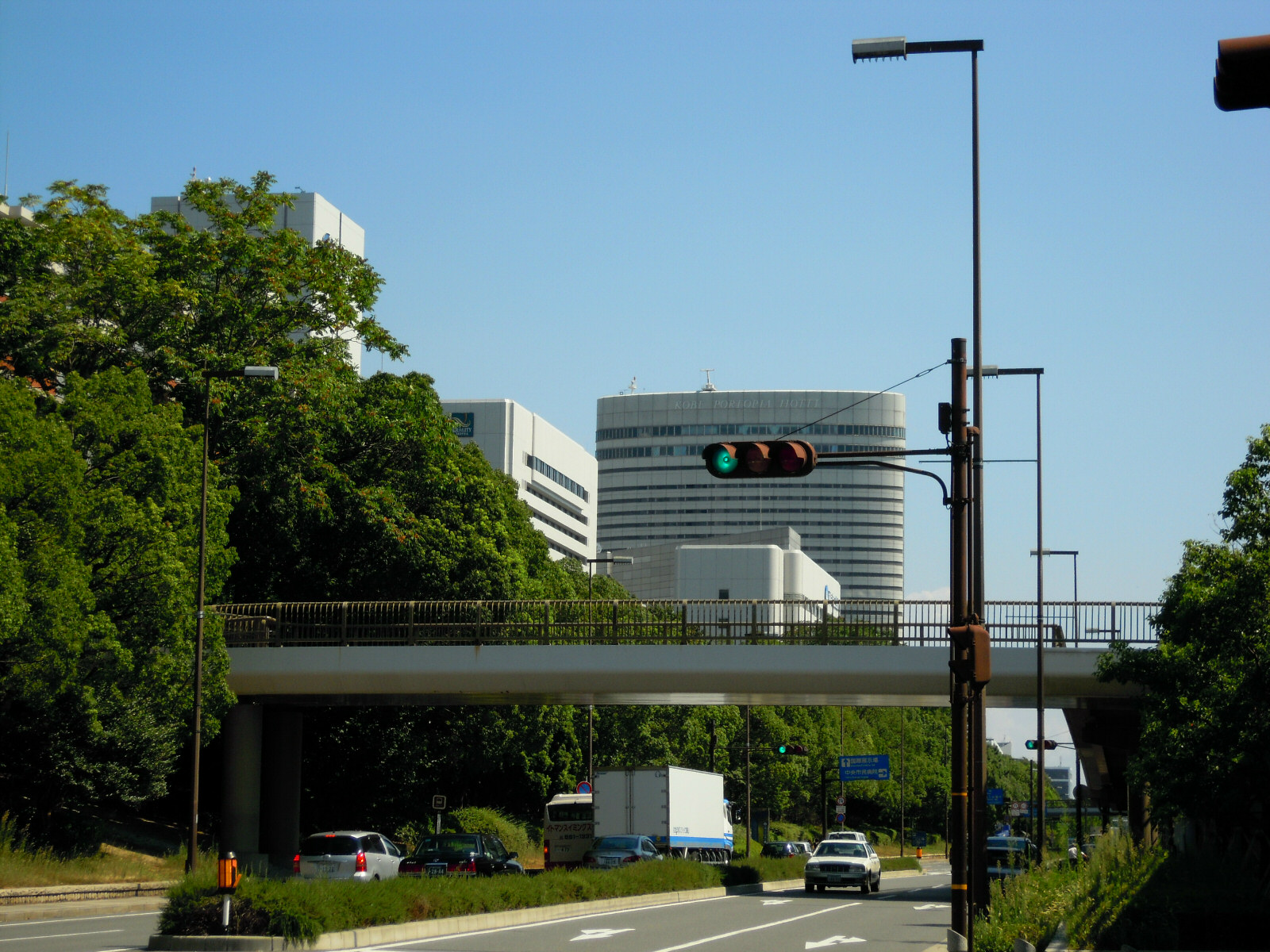 Minatojimanakamachi